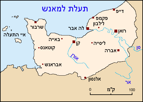 Carte Normandie